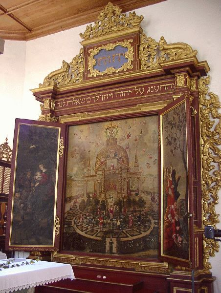 In der evangelischen Dreifaltigkeitskirche in Bad Teinach befindet sich ein besonderes Kunstwerk aus dem 17. Jahrhundert. Es ist die sogenannte kabbalistische Lehrtafel der Prinzessin Antonia von Württemberg. Aus allen Teilen der Welt kommen Gruppen und einzelne Besucher, um diesen großen Schrein im Altarraum der Kirche zu bewundern und sich tiefer in die hier bildhaft dargestellten Zusammenhänge der Heiligen Schrift einführen zu lassen.